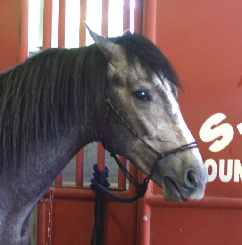 Andalusian